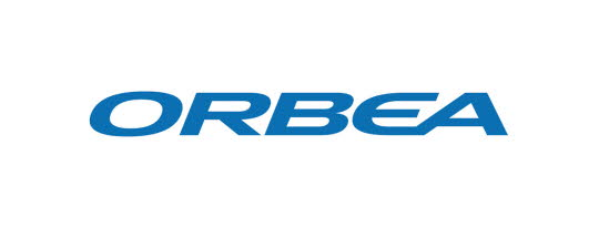 Logo Orbea color azul